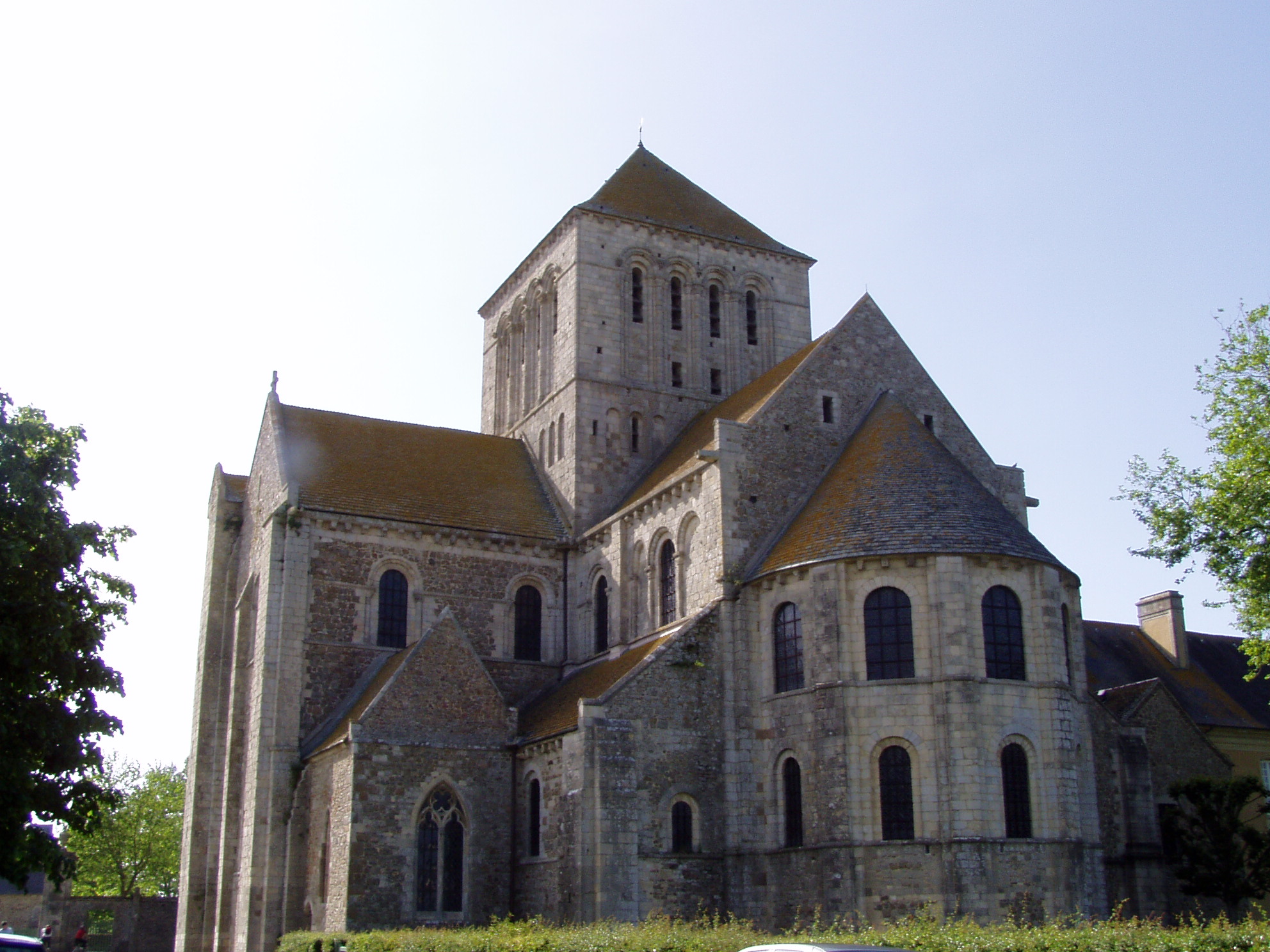 Le chevet de l'abbaye de Lessay, située dans le département de la Manche (France)